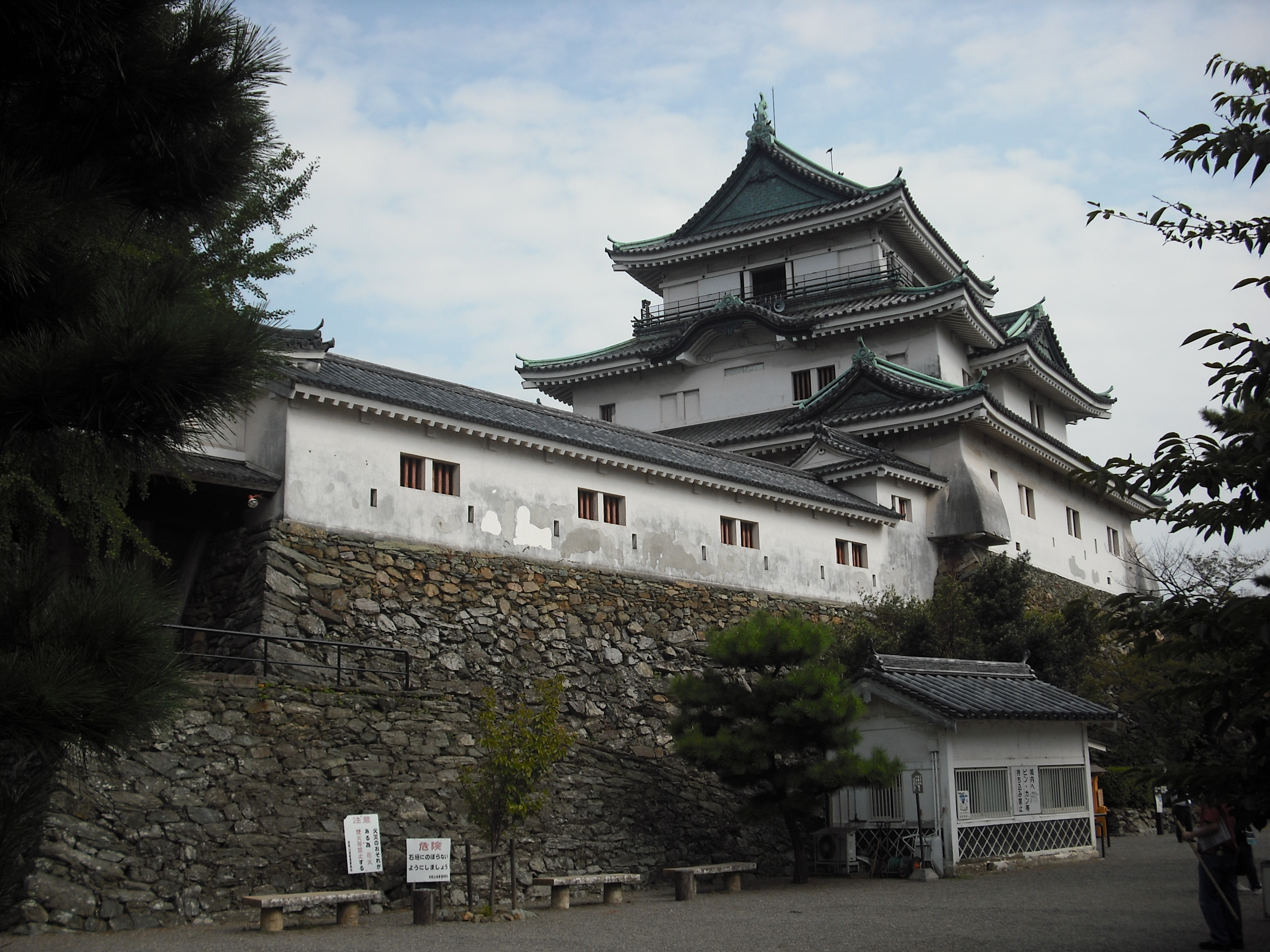 和歌山城 天守曲輪